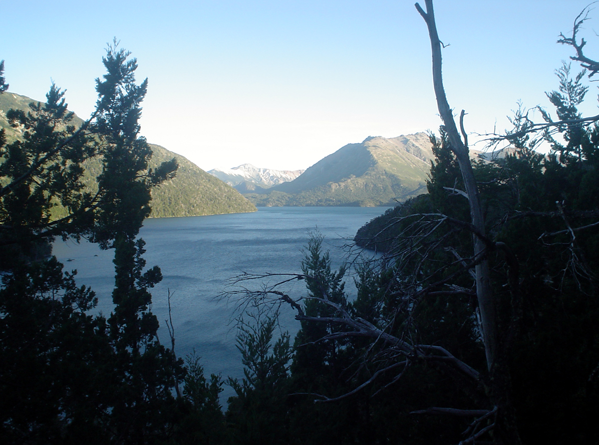 Vista del Lago Mascardi desde el mirador, tomada el 16 de enero de 2007.